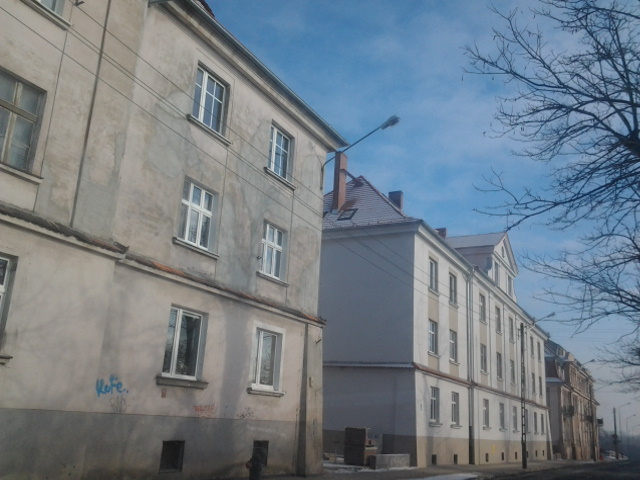 ul. Wspólna w Poznaniu.